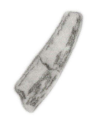 Illustration of a fossil of Sinocoelurus